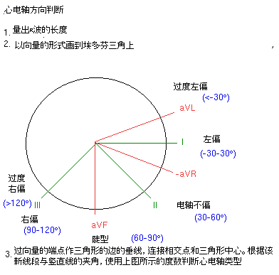 心电轴类型，來源：德语维基。